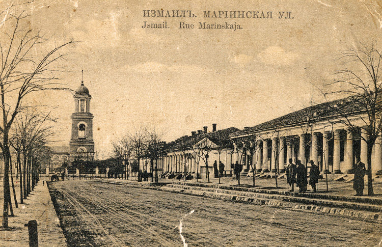 Измаил, бул. Мариинска (сега Суворова). Пощенска картичка от началото на ХХ век. Издание на С. Литвин, Измаил